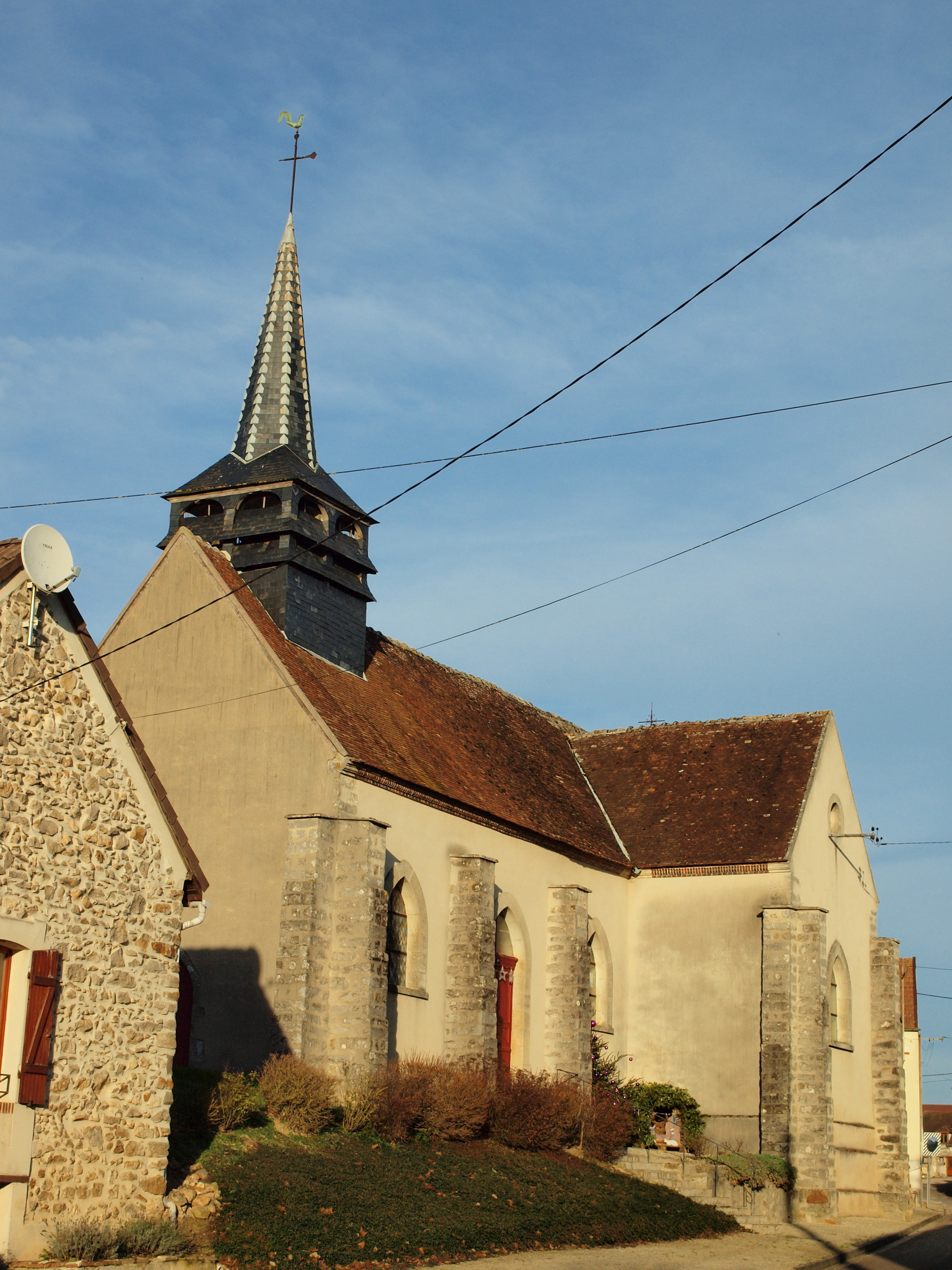 Commune de Plessis-Barbuise (Aube, France)